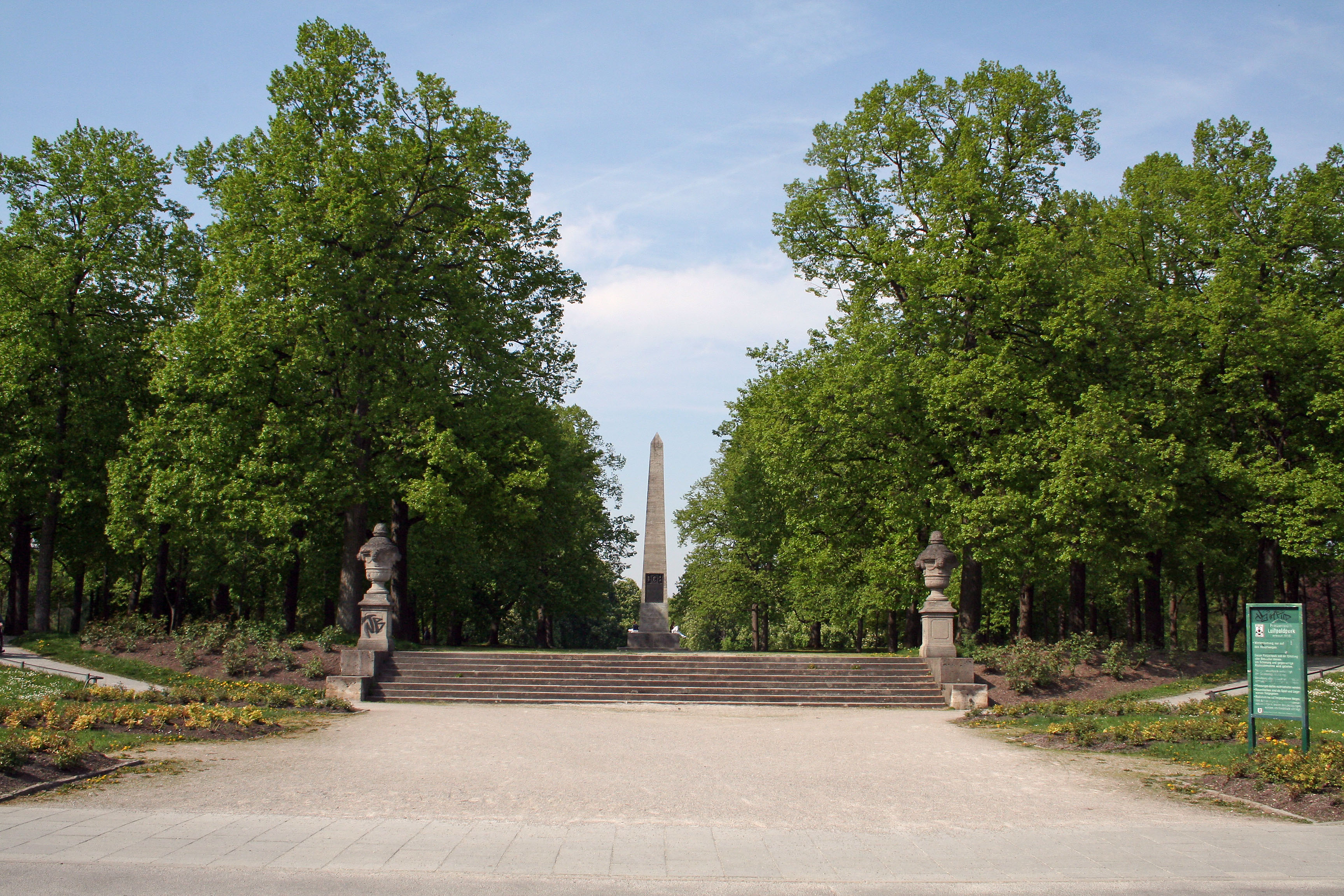 Luitpoldpark in München